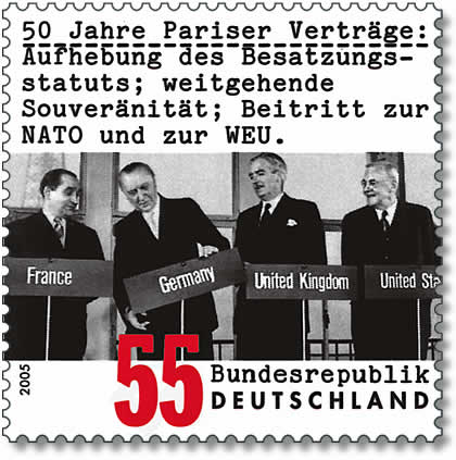 50 Jahre Pariser Verträge: Unterzeichnung der Pariser Verträge; Foto: © Keystone Pressedienst